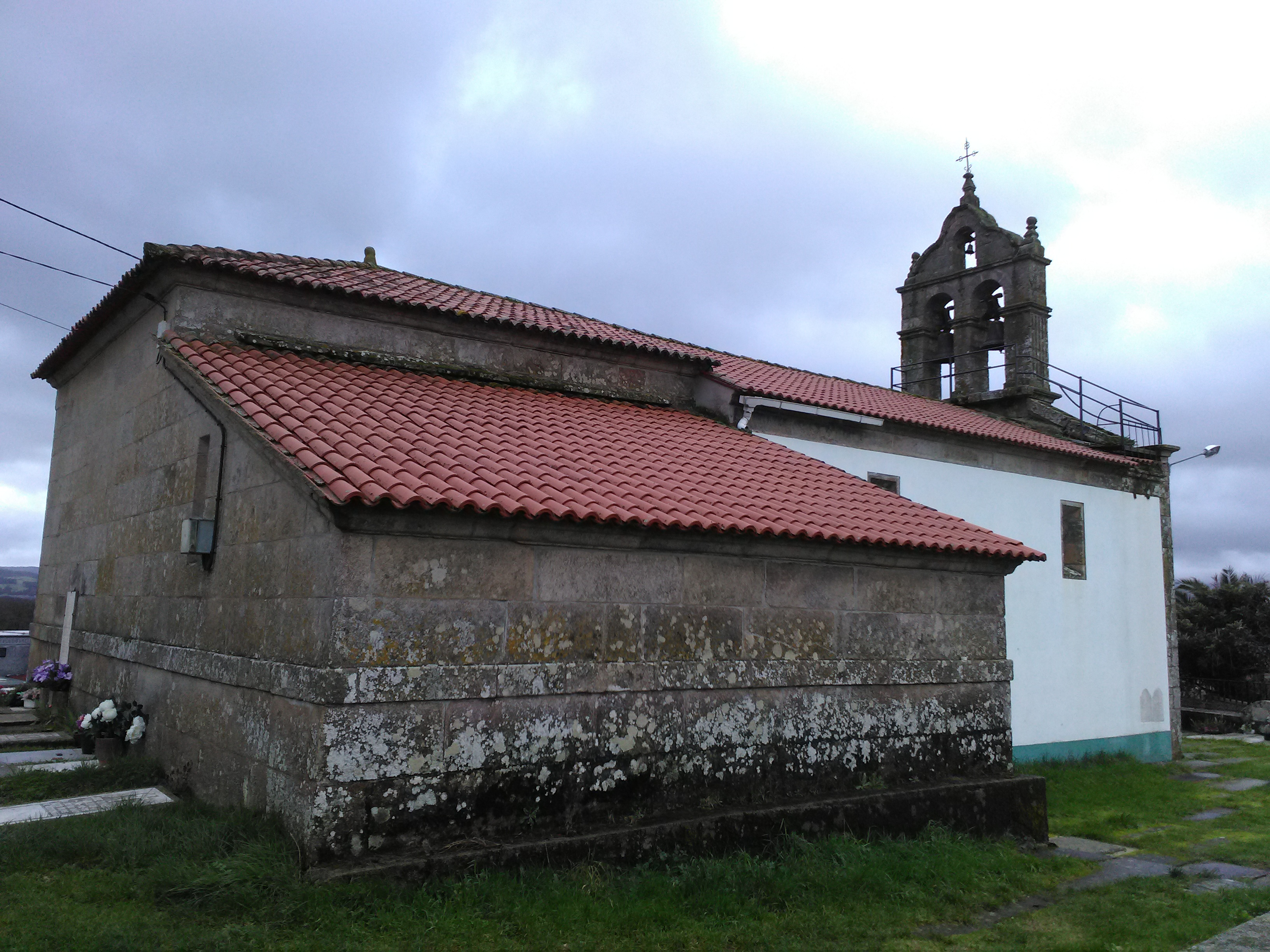 Iglesia parroquial de San Juan de Botos